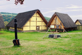 'Keltendorf' in Altburg bei Bundenbach